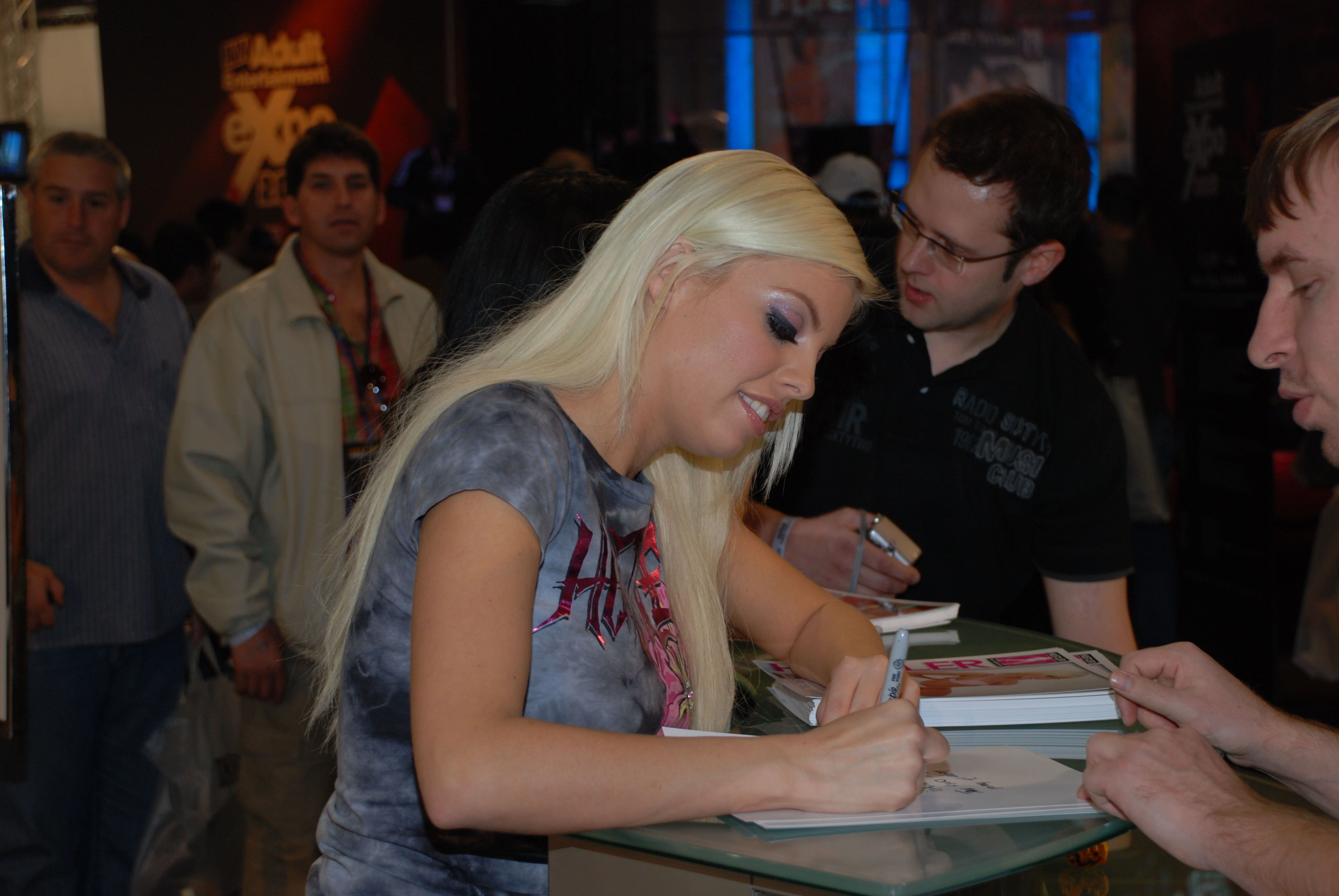 AEE2009_Jan11_Nikon 404